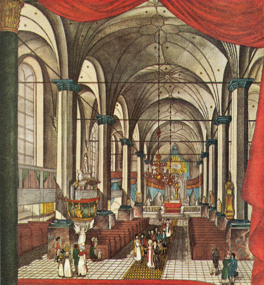 Trinitatis Kirke, Copenhagen, Denmark. Farvelagt stik af J.C.E. Walter.